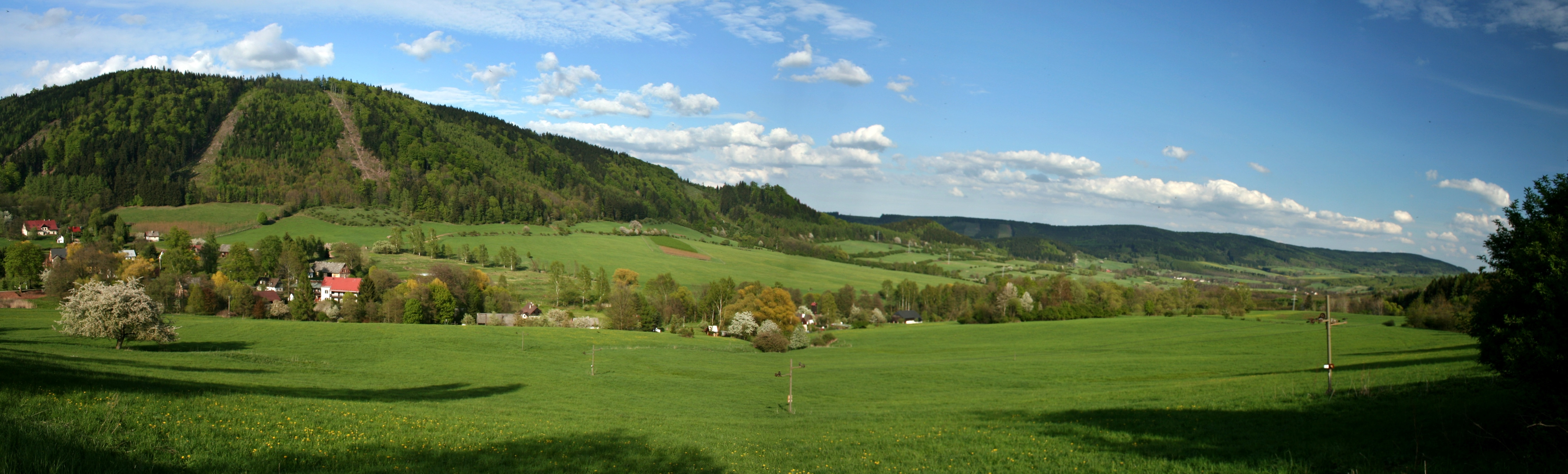 V pozadí Okrzeszyn- Polsko